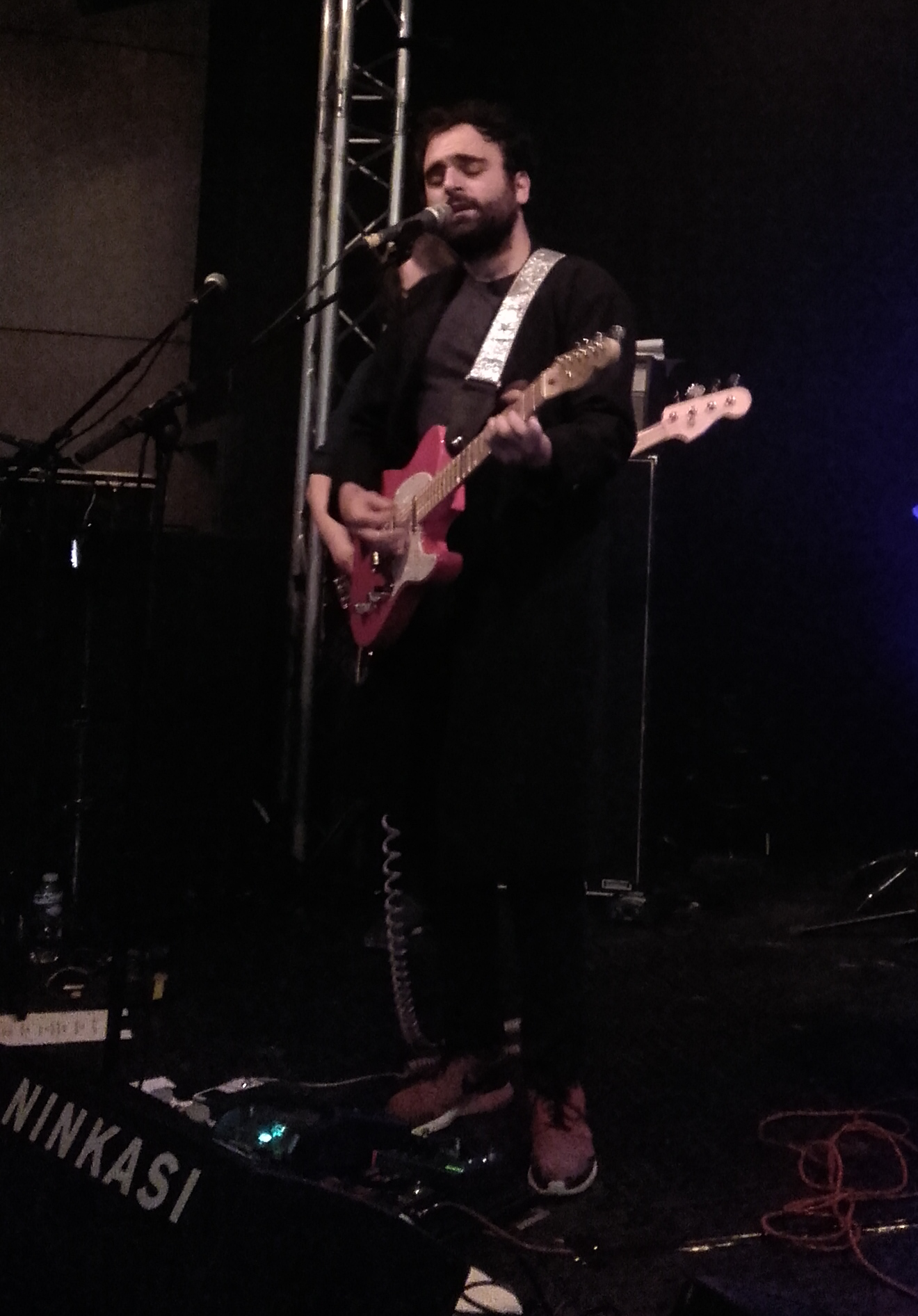 Joseph Chedid, alias Selim, en concert au Ninkasi Gerland (Lyon) le 28 avril 2016.